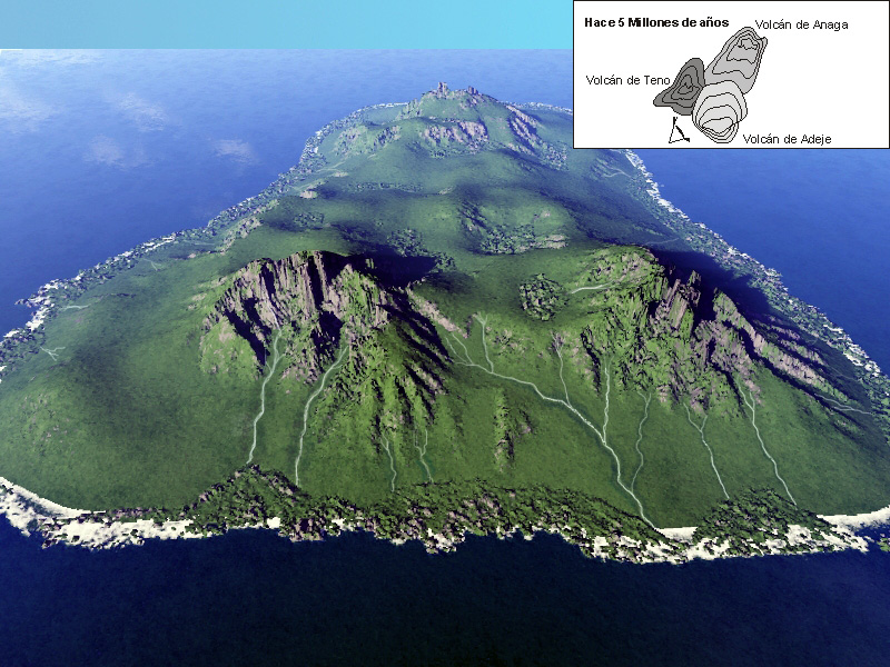 Segunda etapa de generación del Teide